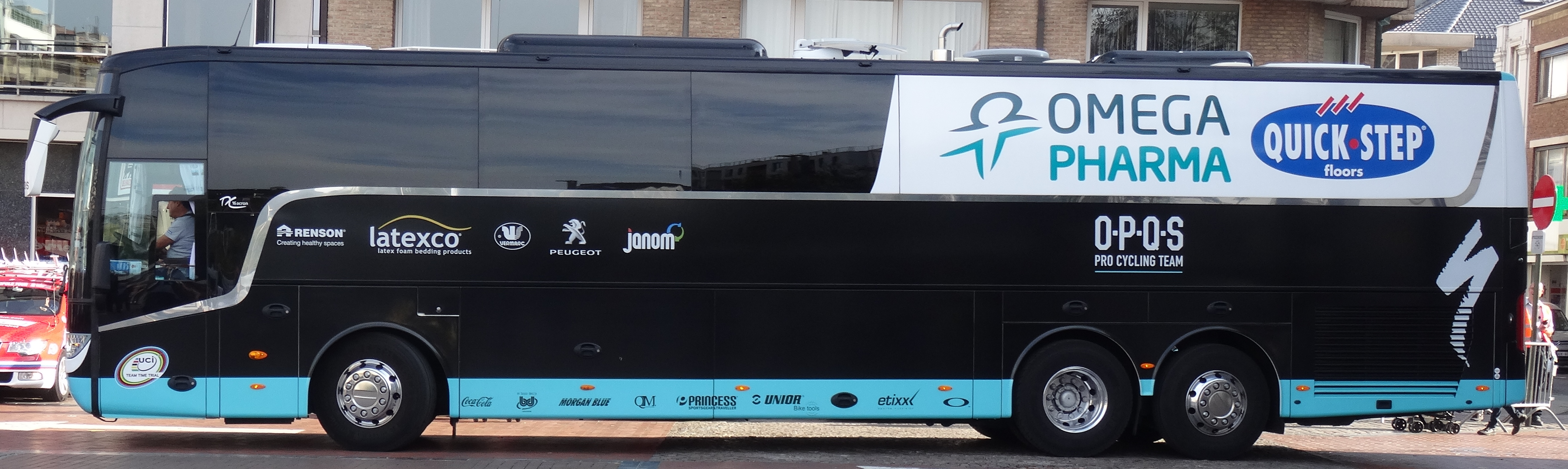 Reportage photographique réalisé le samedi 4 octobre à l'occasion du départ de la troisième étape de l'Eurométropole Tour 2014 à Blankenberge, Belgique.